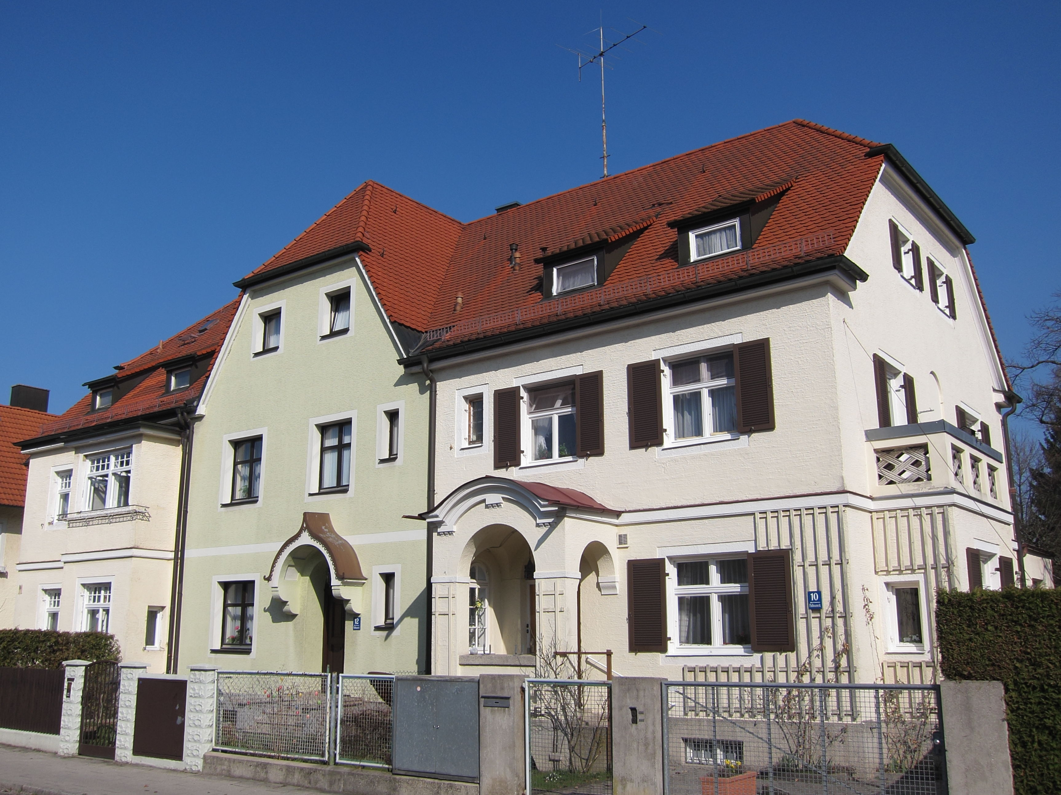 Floßmannstraße 10/12/14; Reihenhäuser, asymmetrisch, historisierend, 1910–11 von Carl Schmidt.